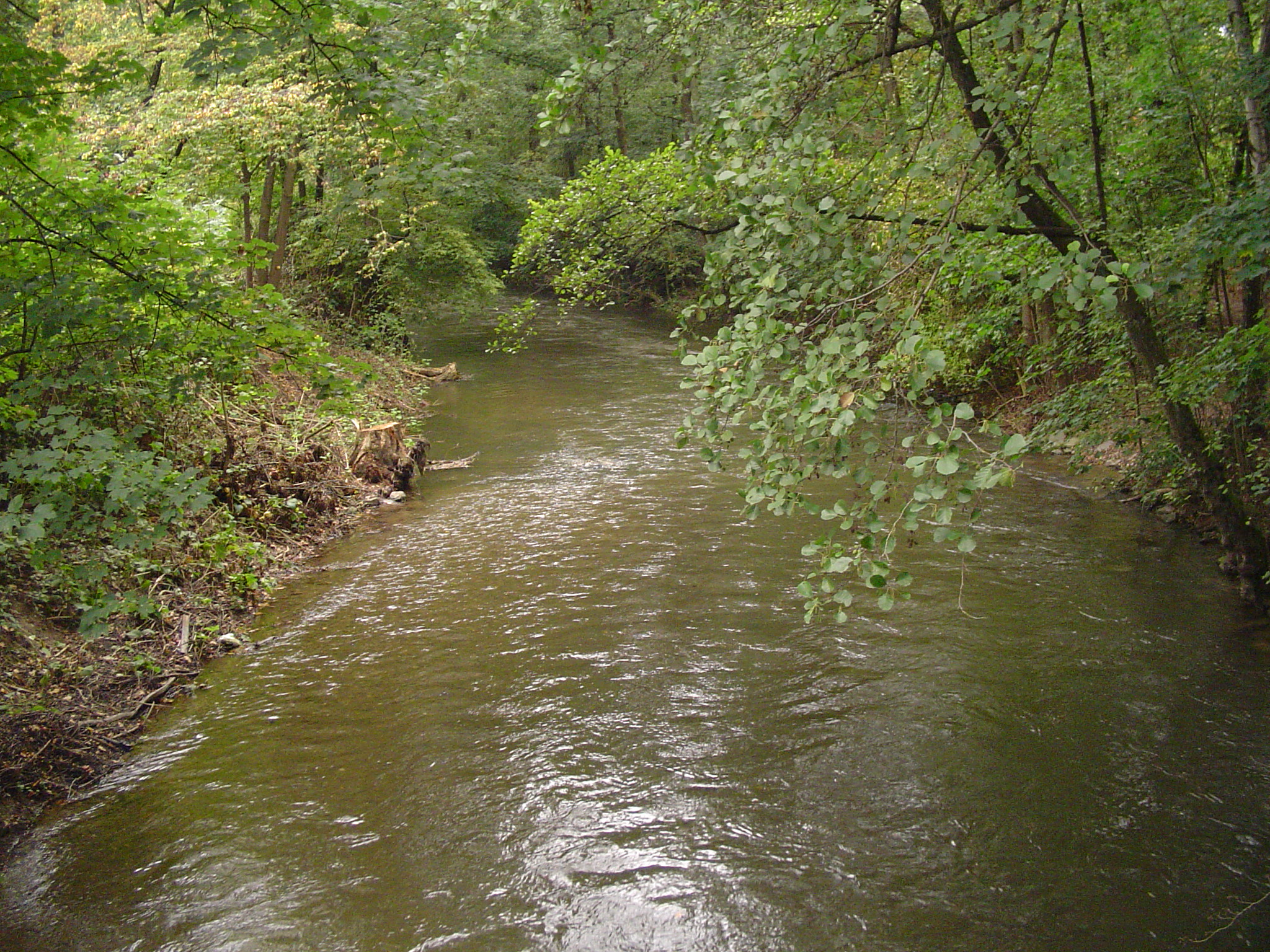 Der Fluss Dhünn bei Leverkusen.